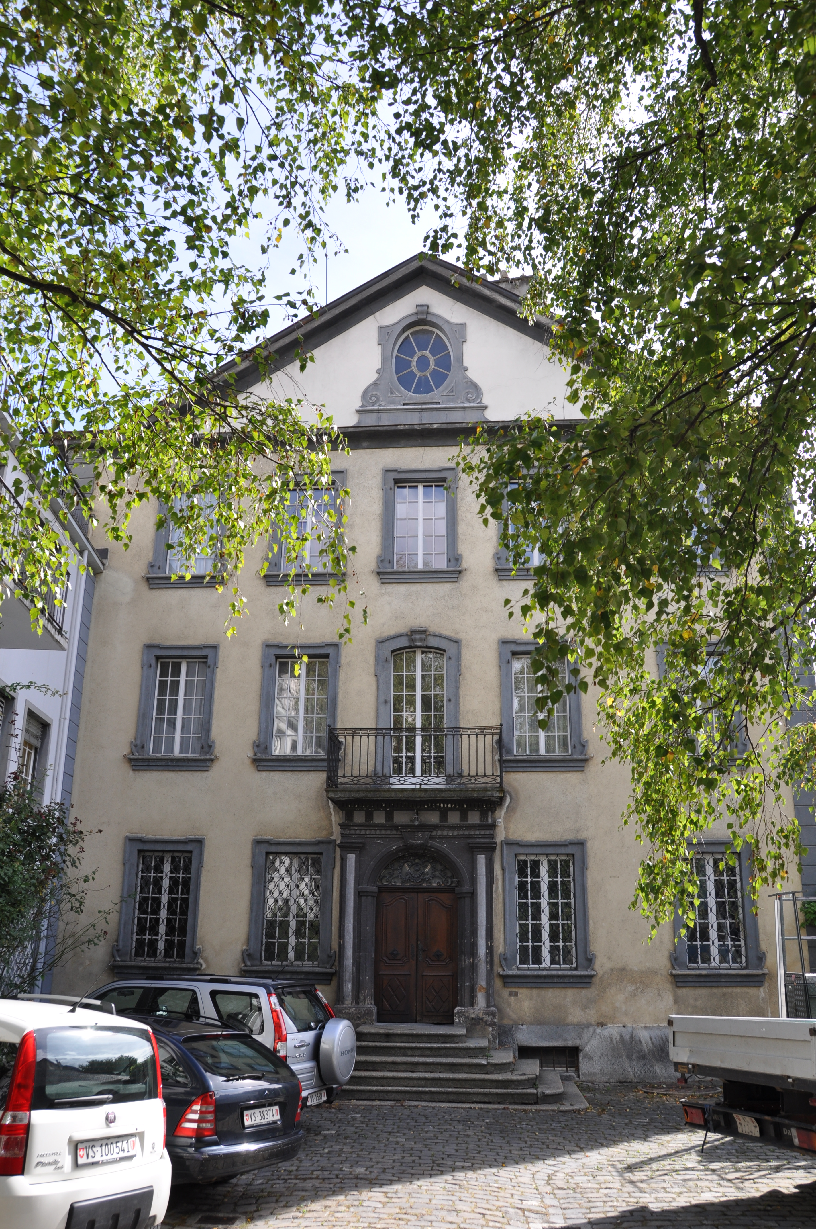 Ehemalige Präfektur des Départements Simplon (Maison de Kalbermatten)